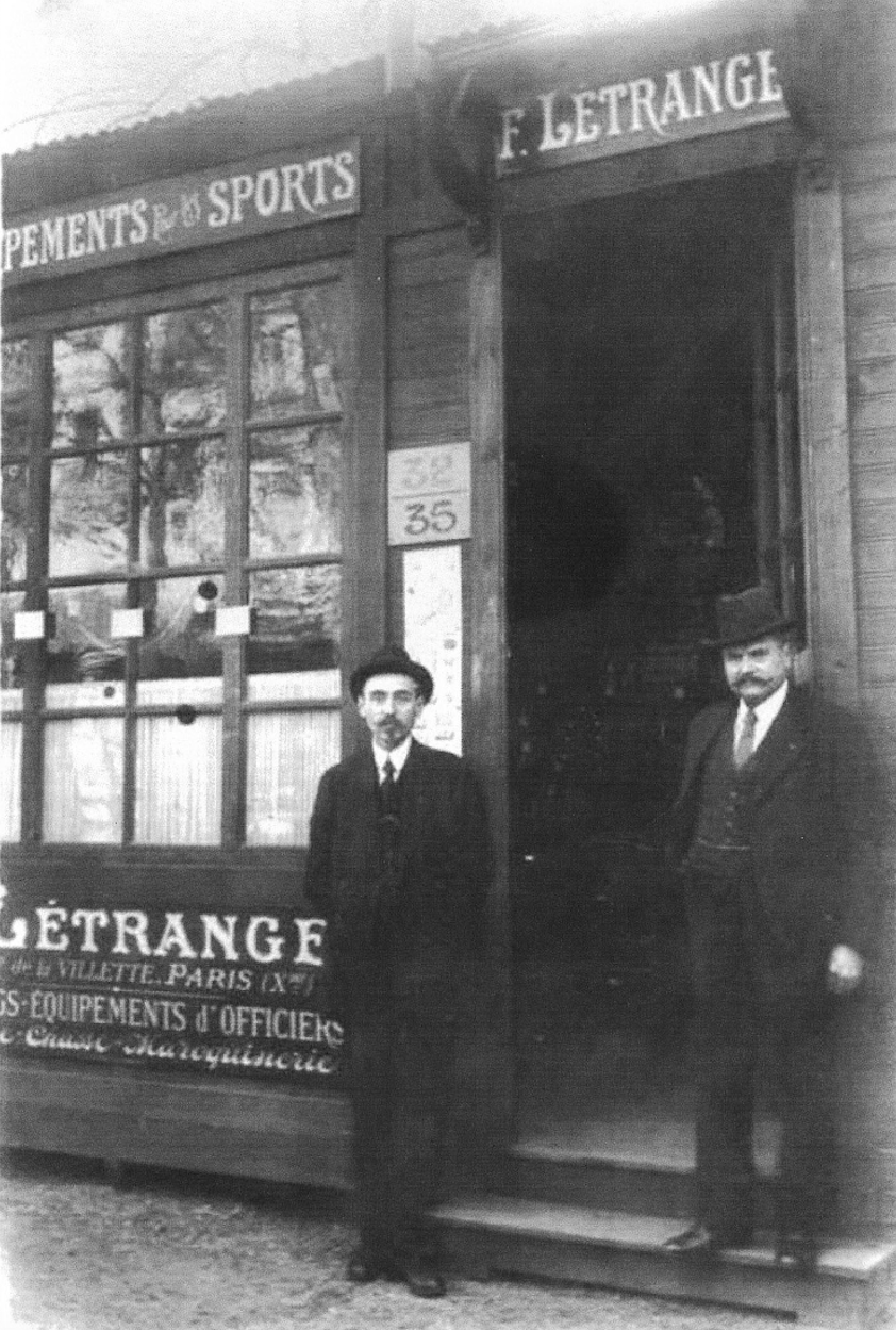 Les Établissements Létrange à la foire Internationale de Lyon, 1917